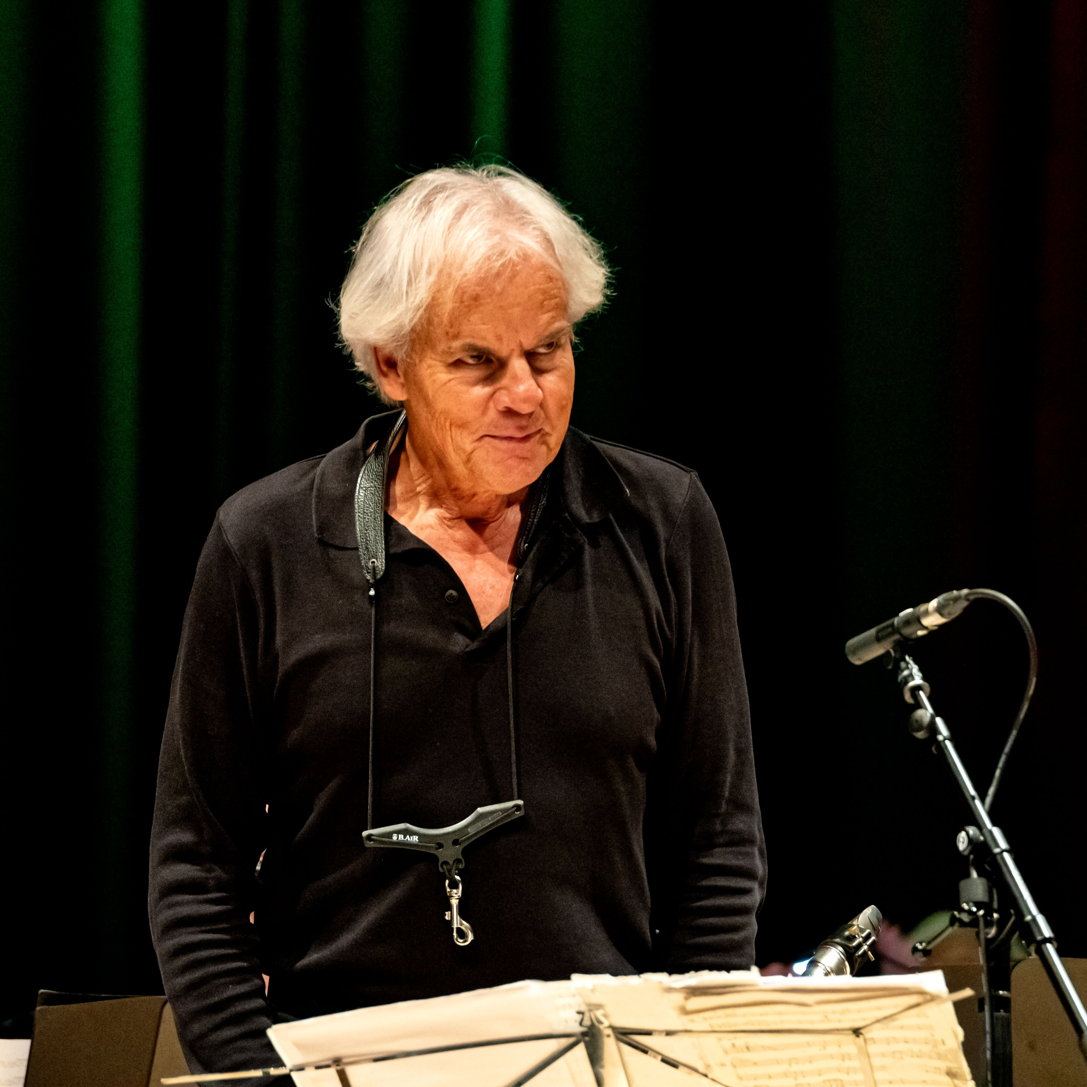 "Jeux Doubles" des Freiburger Akkordeon Orchesters im Forum Merzhausen am 15. 12. 2018 mit den Solisten Jean Lous Matinier Akkordeon und Michael Riessler Bassklarinette